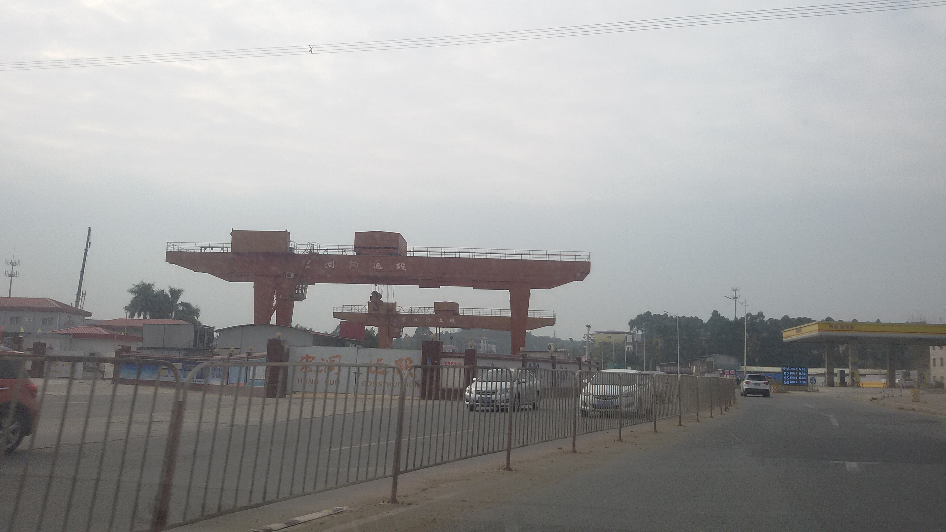 粵語: 2018年1月1號，中新站重喺度起緊。